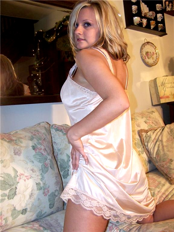 Woman wearing pale pink slip